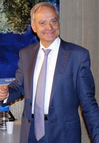 André Brahic, astrophysicien, l'un des promoteurs du programme Herschel, lors d'une conférence sur les satellites Herschel & Planck dans l'auditorium de l'établissement de Cannes de Thales Alenia Space